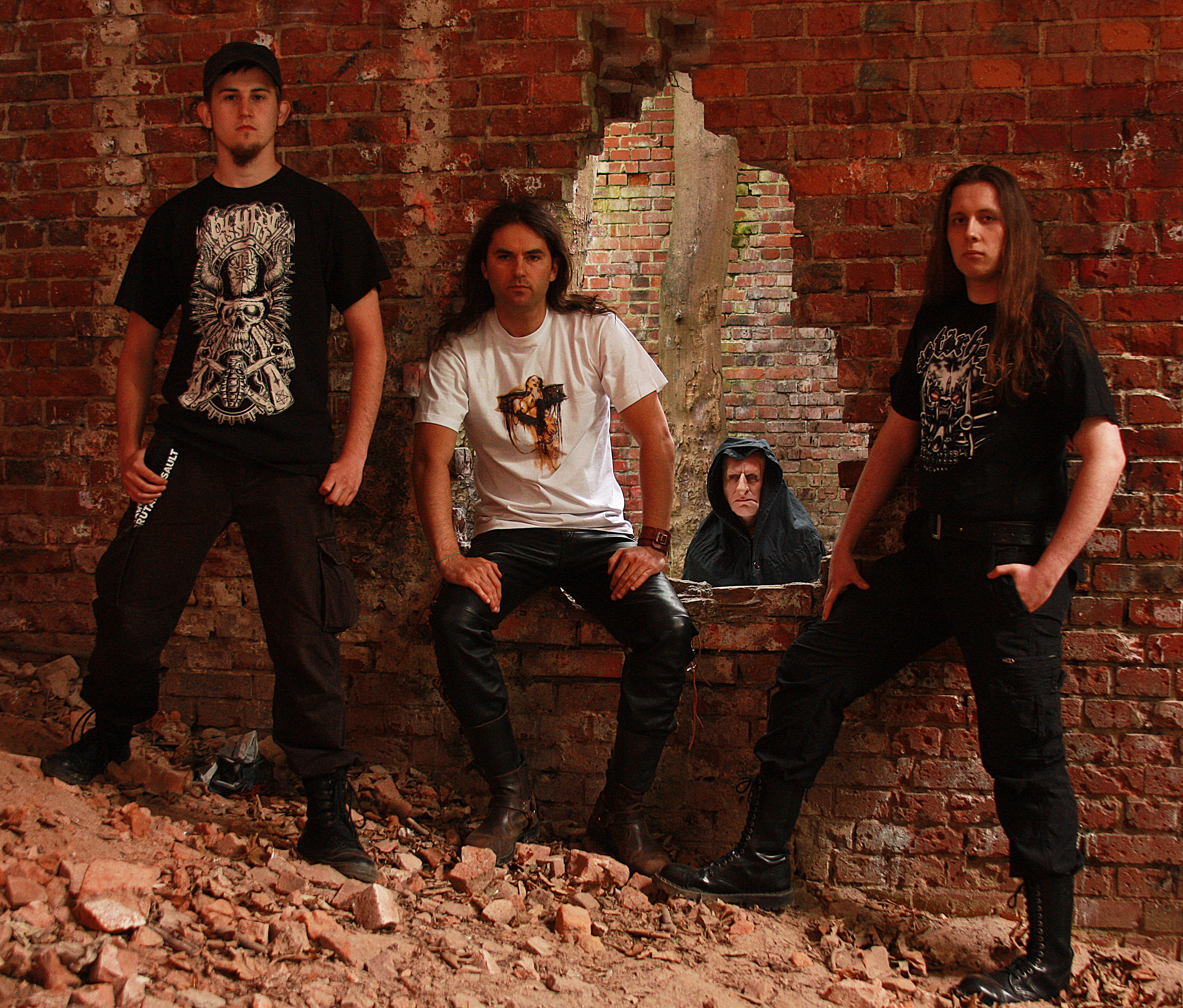 Sesja V-Column zespołu Grimlord